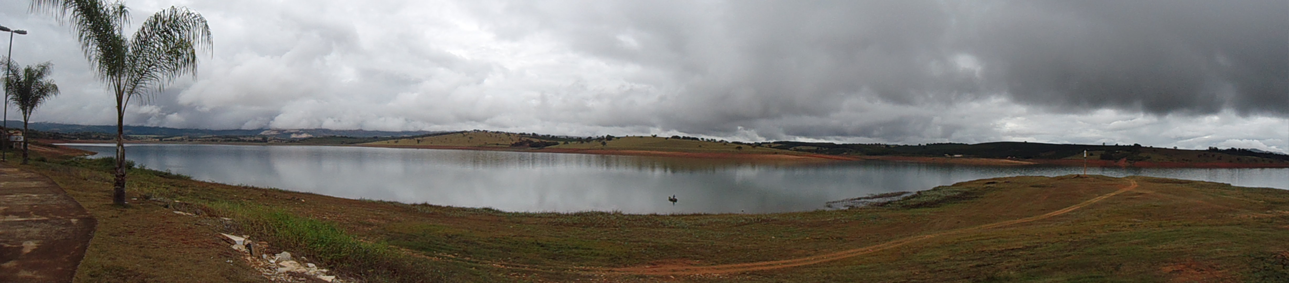 Panorama do lago de furnas na orla da cidade durante o período de seca do lago.